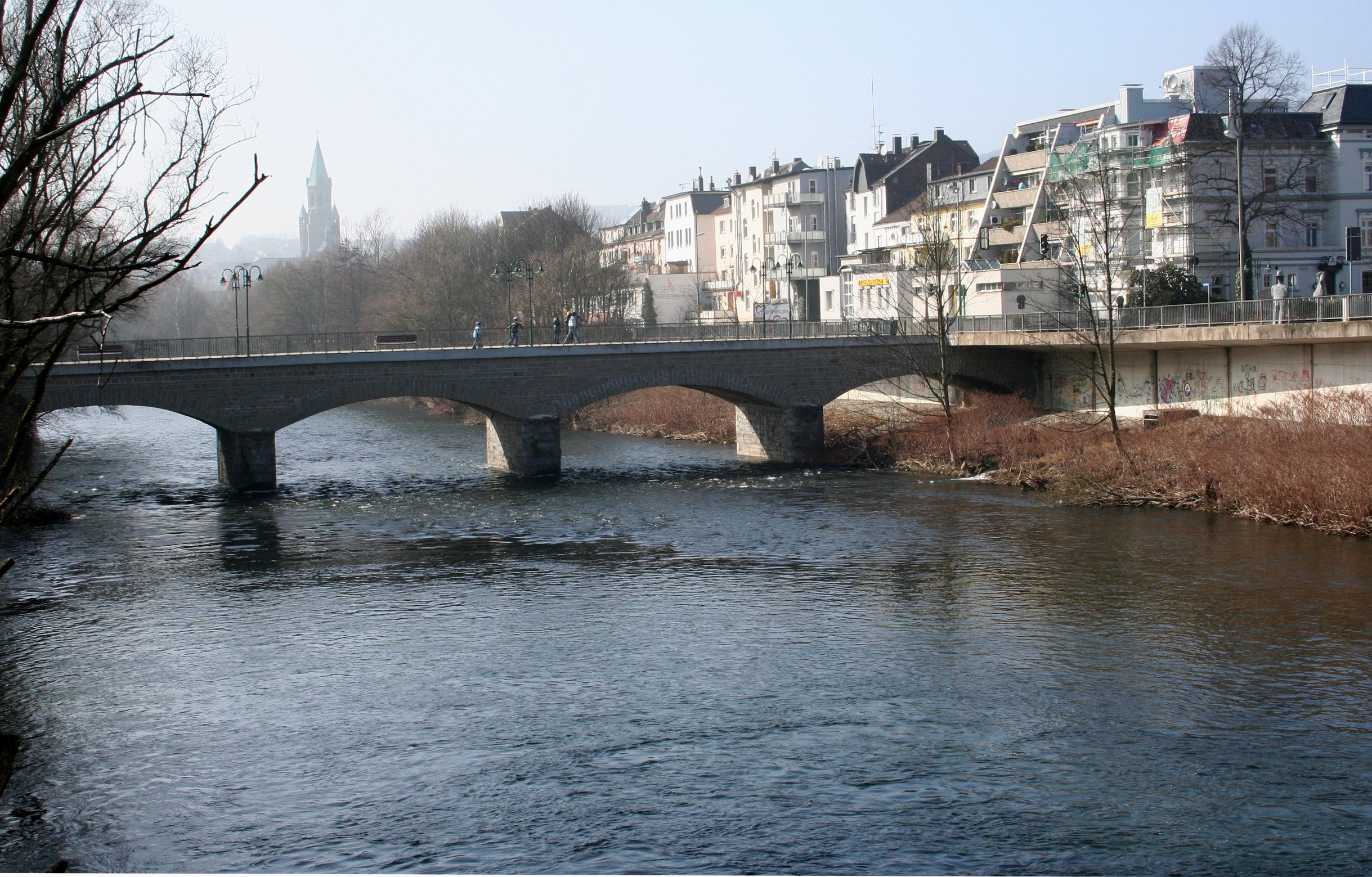 Description: Brücke über die Lenne in Iserlohn-Letmathe. Aus Sandsteinquadermauerwerk 1899/1900 erbaut. Instandsetzung 1994. Source: selbst fotografiert Date: 19. März 2006 Author: Asio otus